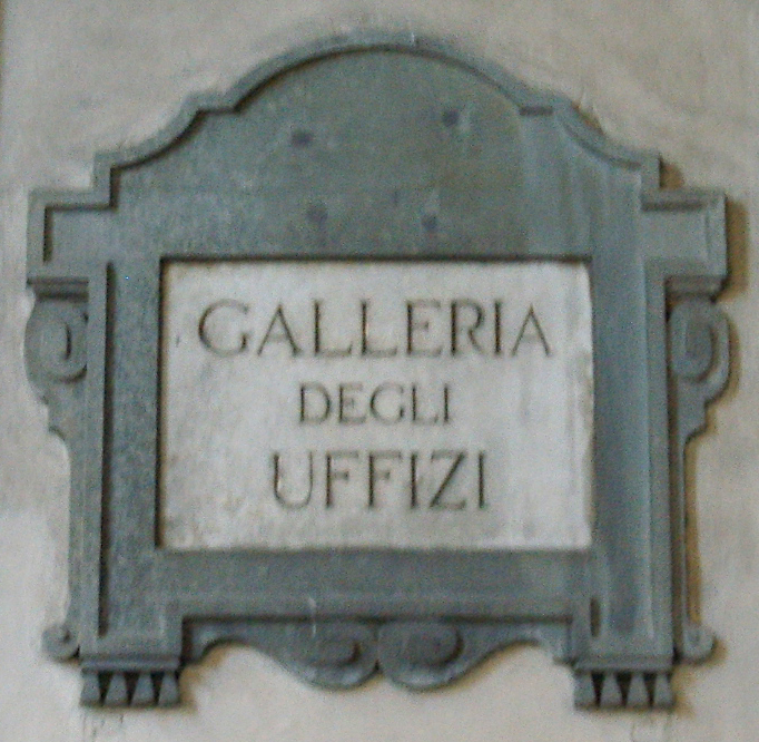 Galleria_degli_Uffizi,_plaque